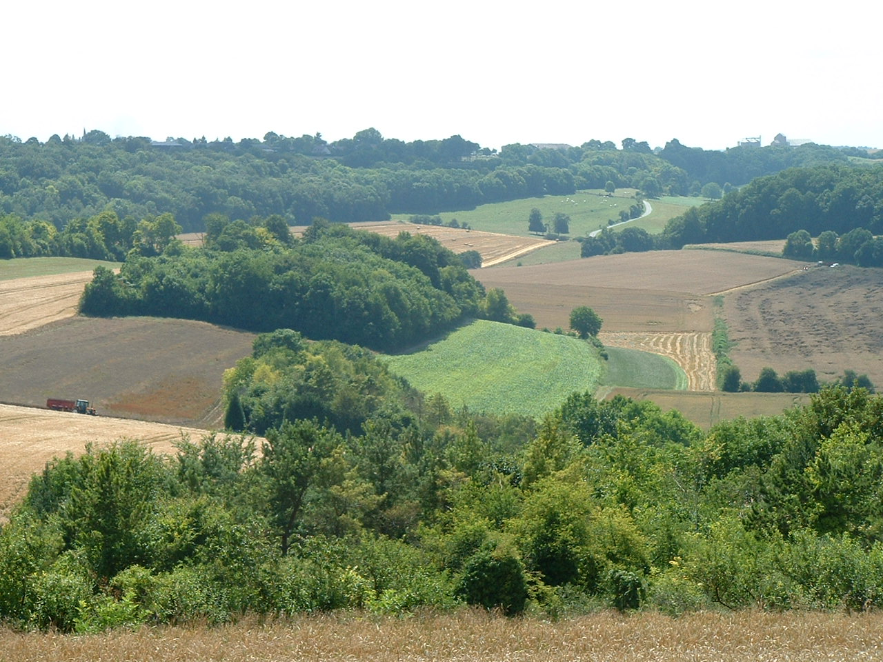 Les hauts de Thoix (Somme) : vue vers la vallée du Ruisseau des Parquets